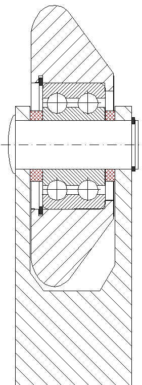 rolka do wyoblania Użycie za podaniem autorstwa (Creative Commons CC-BY 2.5) Autor: --Pawel S 00:42, 20 kwi 2007 (CEST) Rysunek wykonany w programie OpenOffice Draw